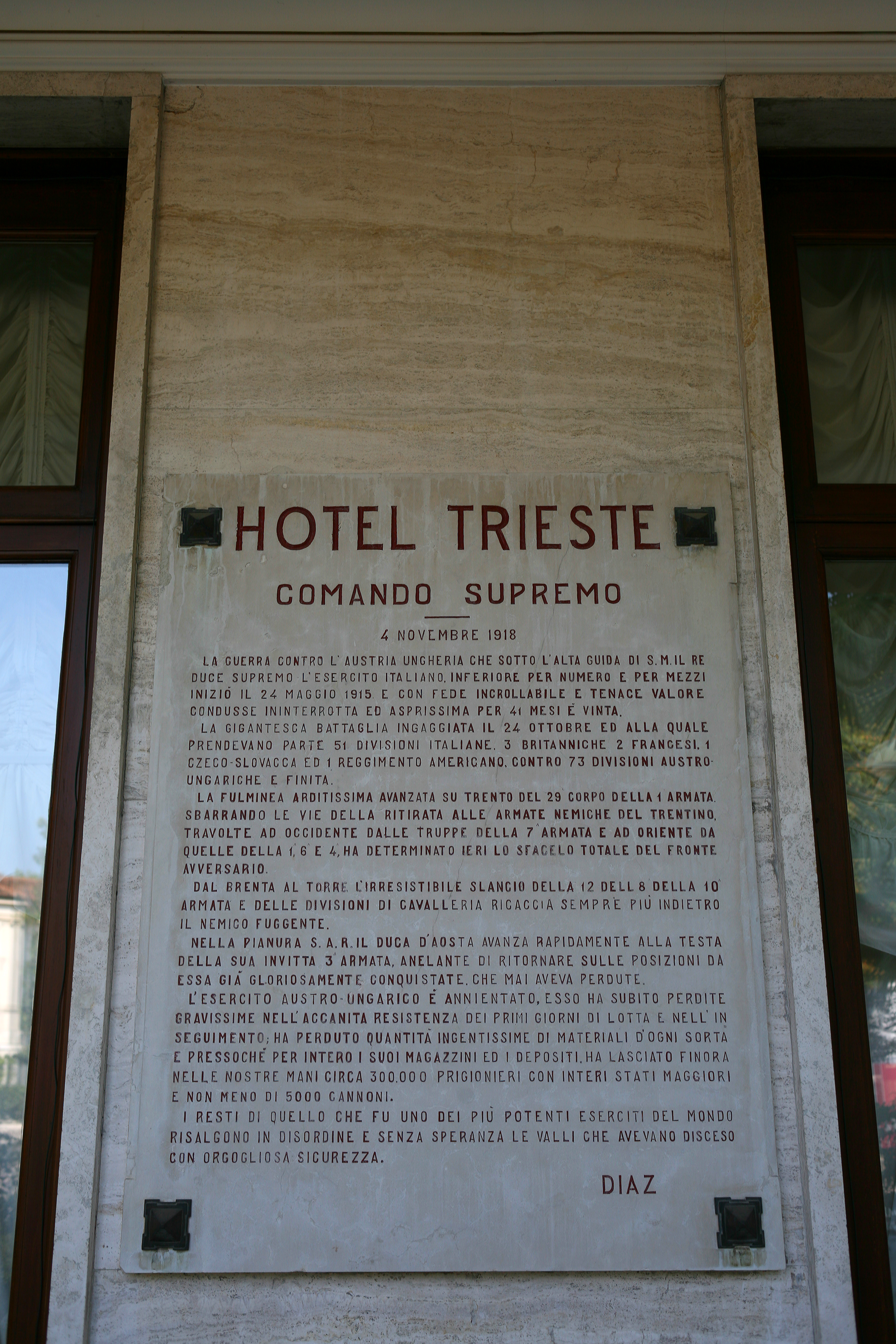 Hotel Trieste & Victoria ad Abano Terme, il Bollettino della Vottoria